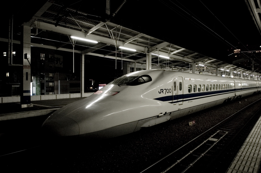 Nozomi 700 series Shinkansen at okayama station April 29 2007.